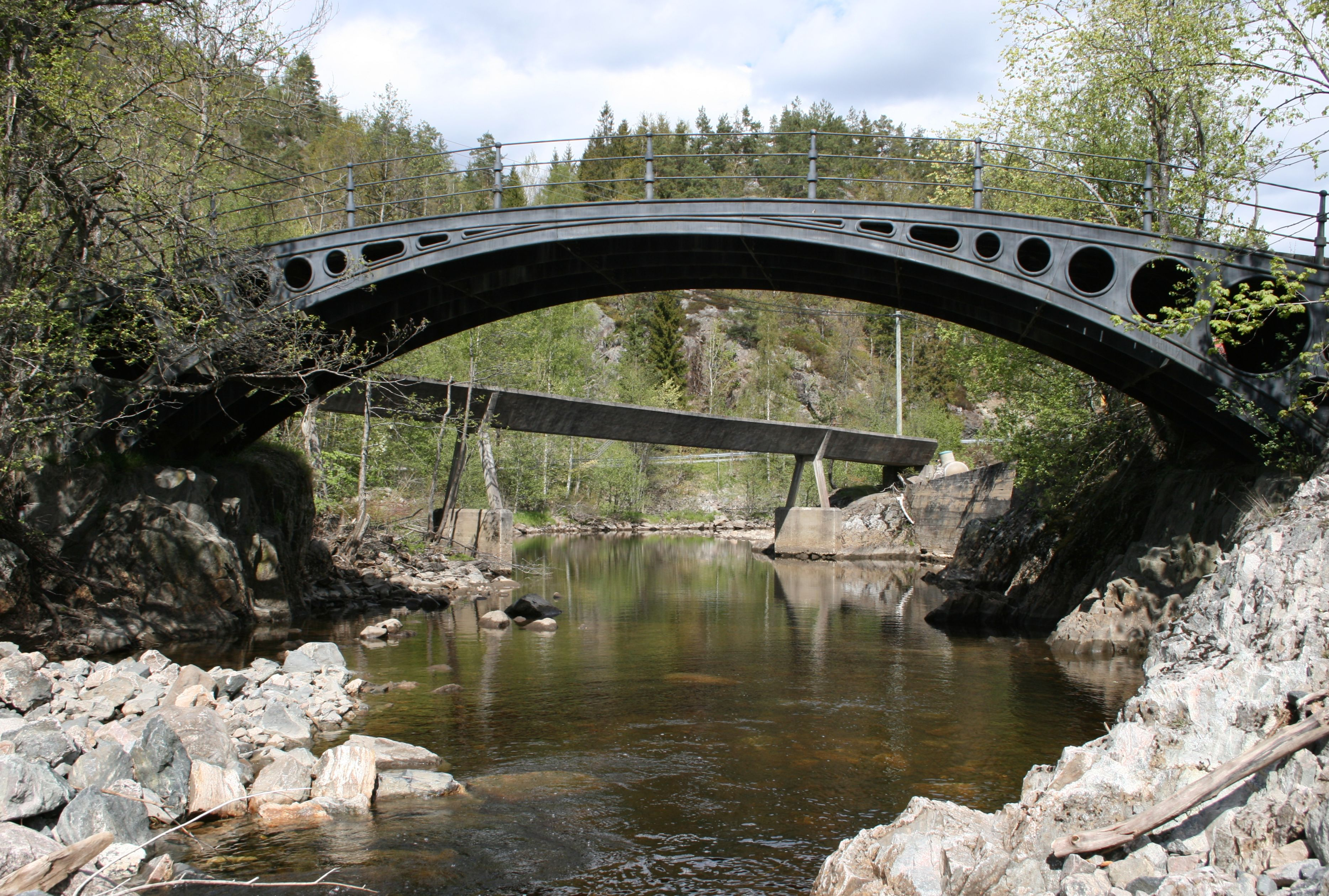 Fosstveit bru Tvedestrand